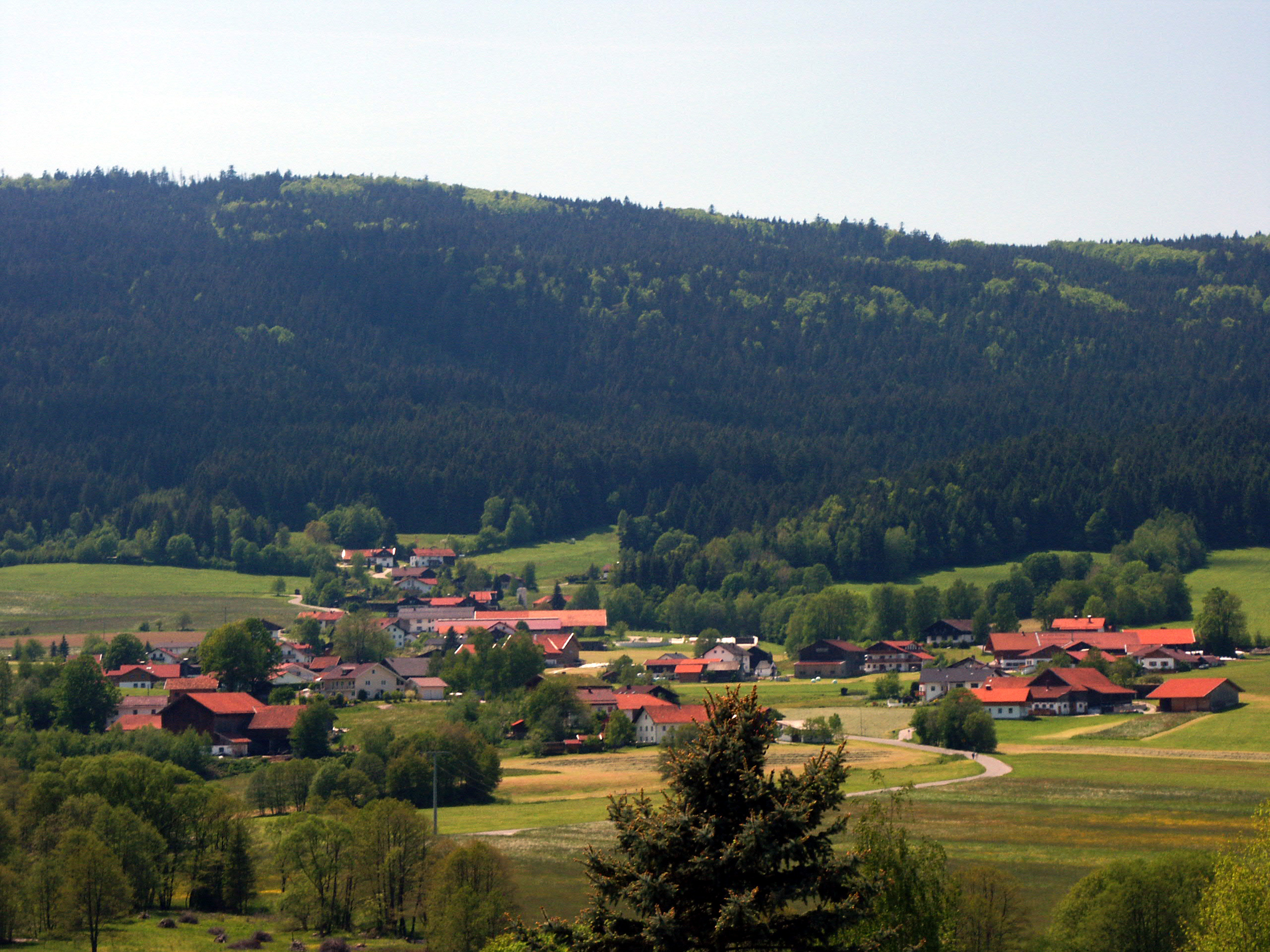 Lindenau in der Gemeinde Achslach - Blick vom Achslacher Kirchberg